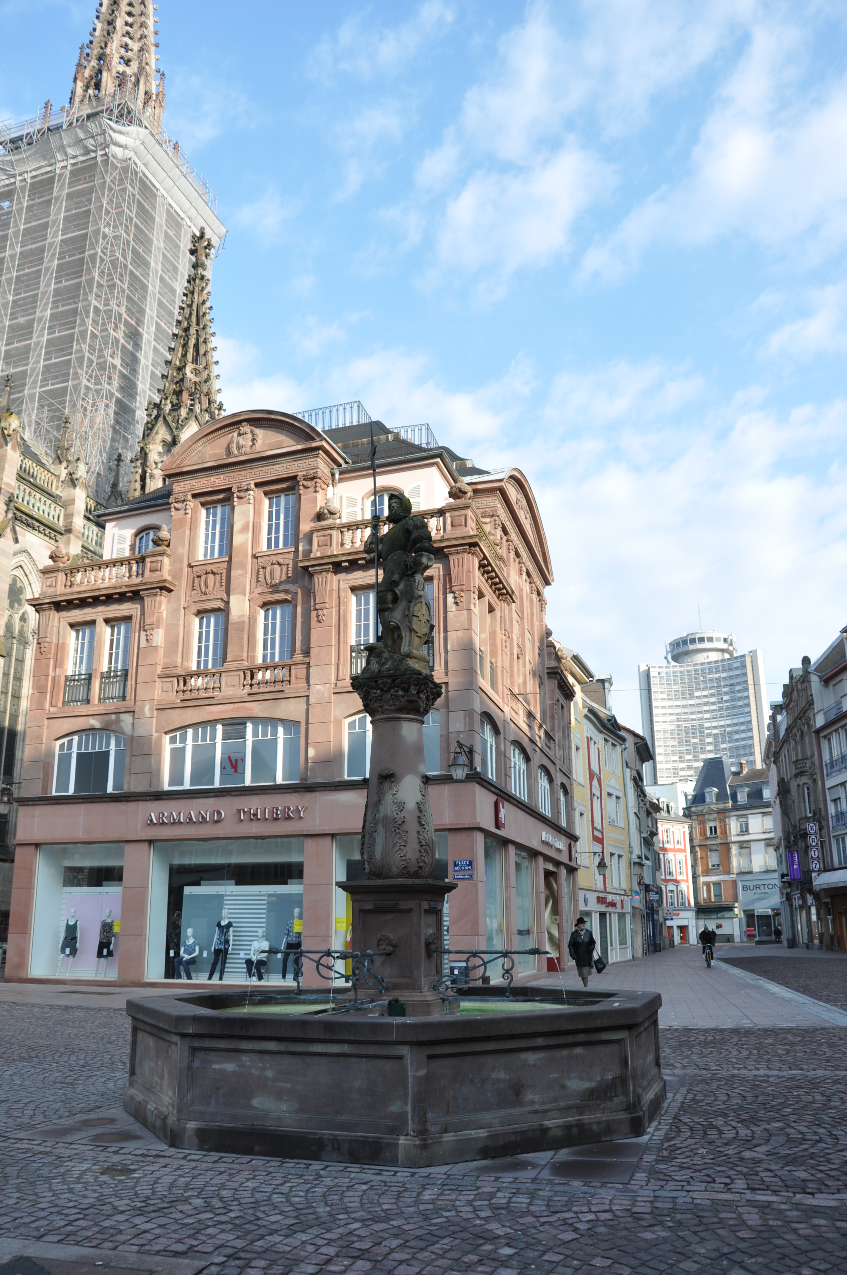 Statue sur la place de la Réunion. A gauche, le Temple Saint-Étienne, au fond, la Tour de L'Europe